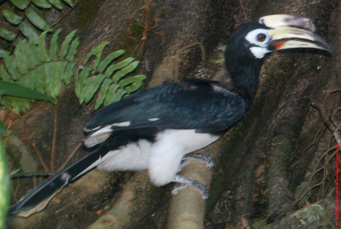 Di Hilir Perak, burung enggang tangling ini dikenali dengan nama burung langling.